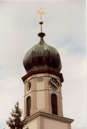 Turm der evangelischen Kirche im Städtchen Rheineck, Kanton St. Gallen, Schweiz. - Aufnahme: Jakob Vetsch, im Februar 1995.